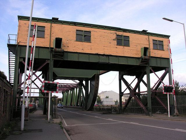 Duke Street Bridge